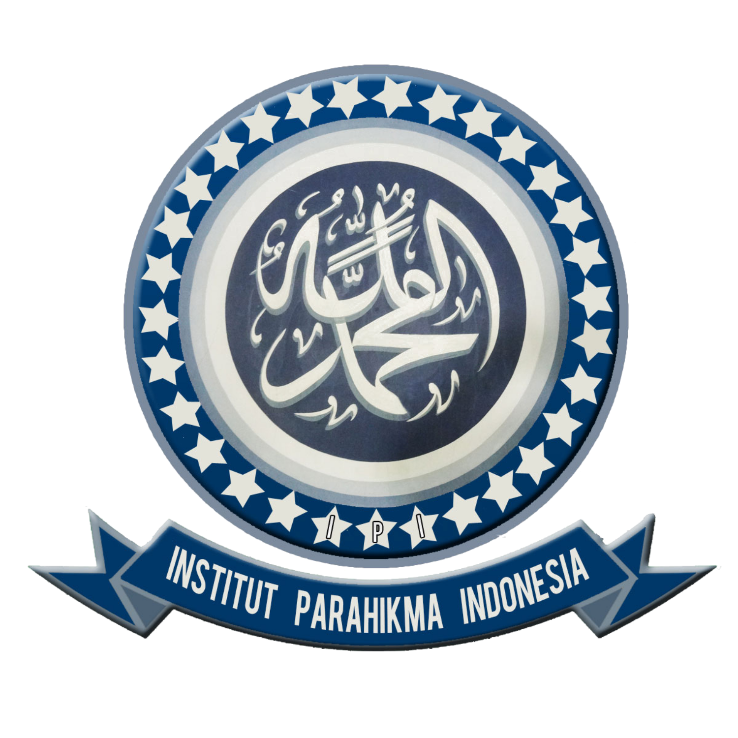 Logo Insitut Parahikma Indonesia (IPI) Gowa